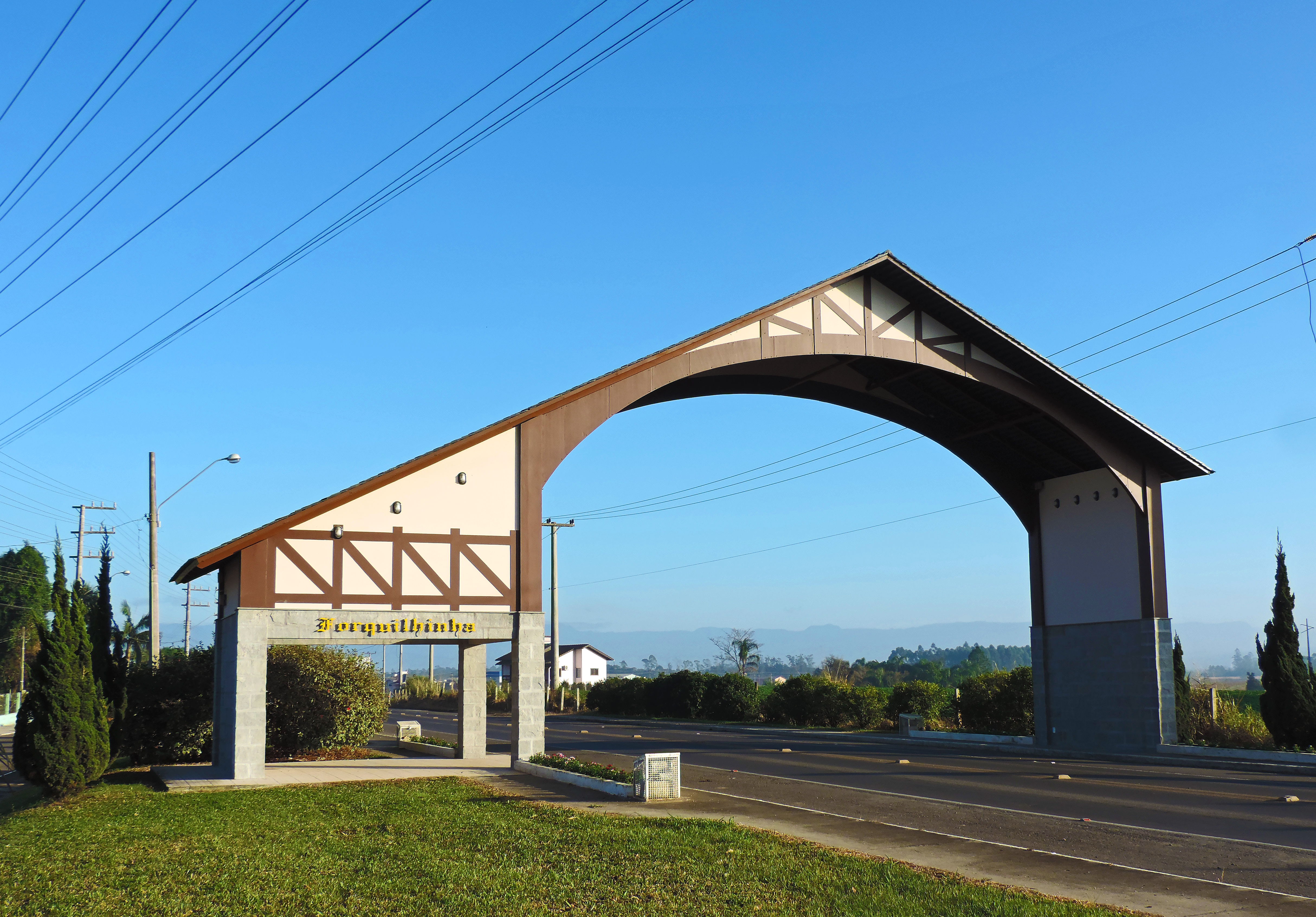 Com detalhes germânicos, é um dos principais acessos à Forquilhinha.